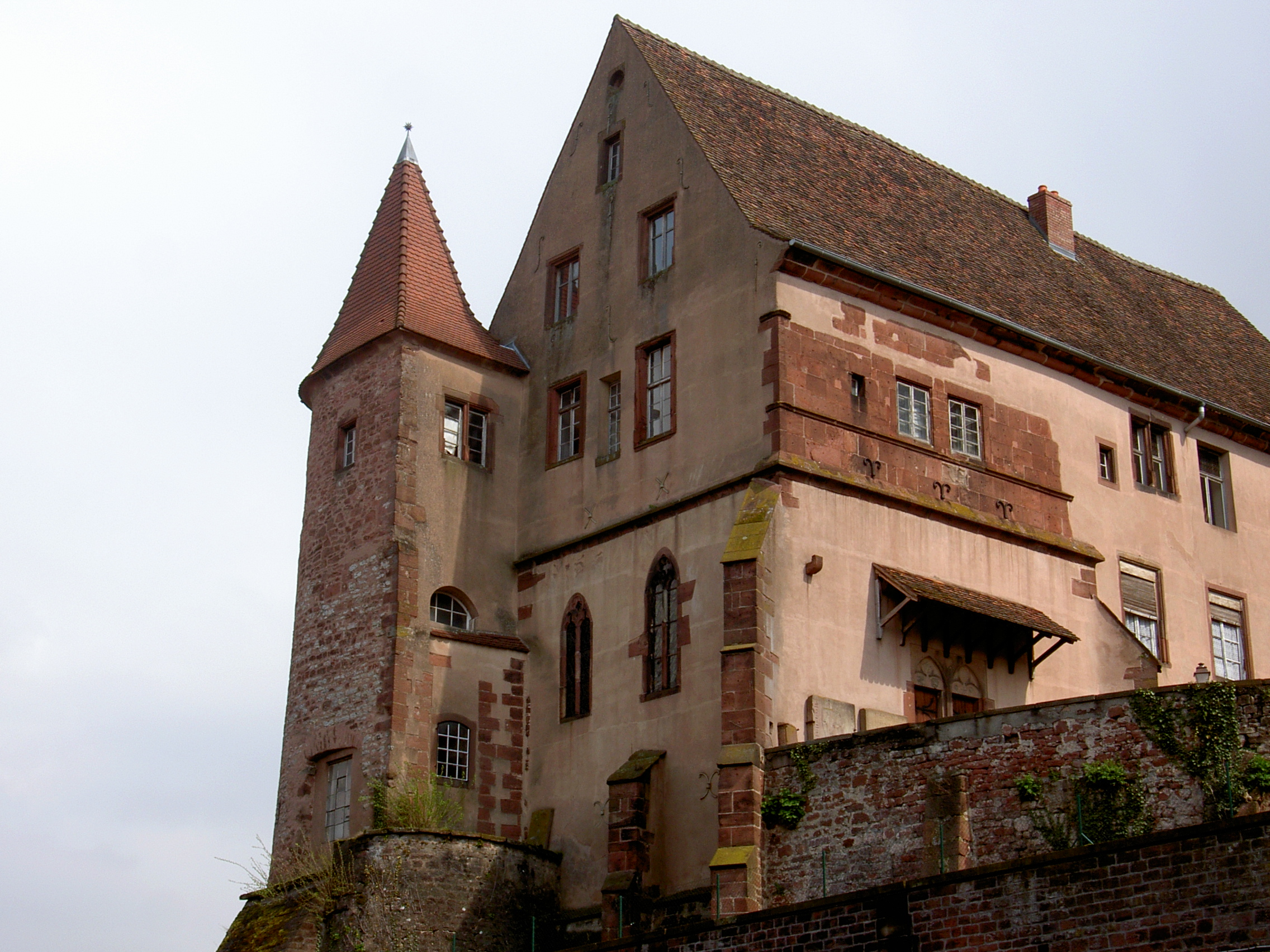 Bâtiment de l'Oberhof et TOur Cagliostro